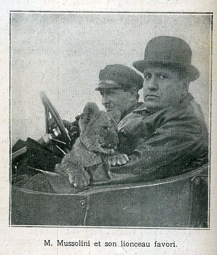 see picture